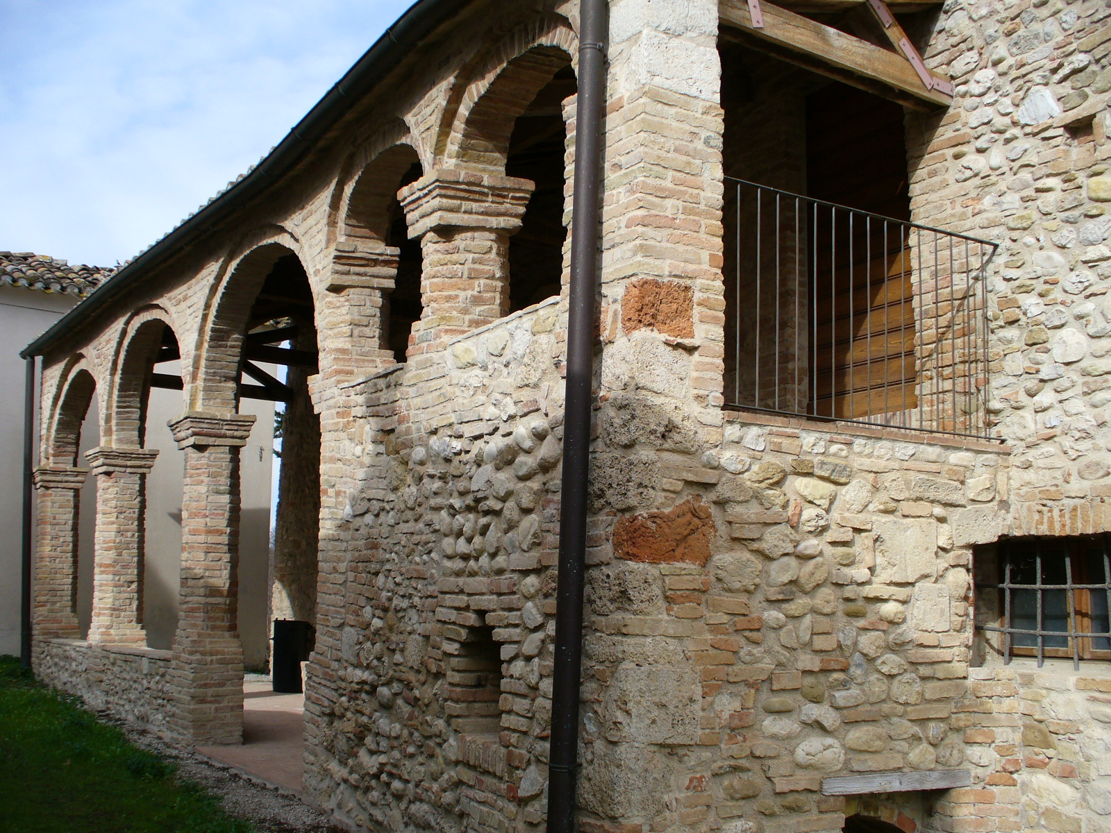 Die Kirche San Massimo in Torano Nuovo.